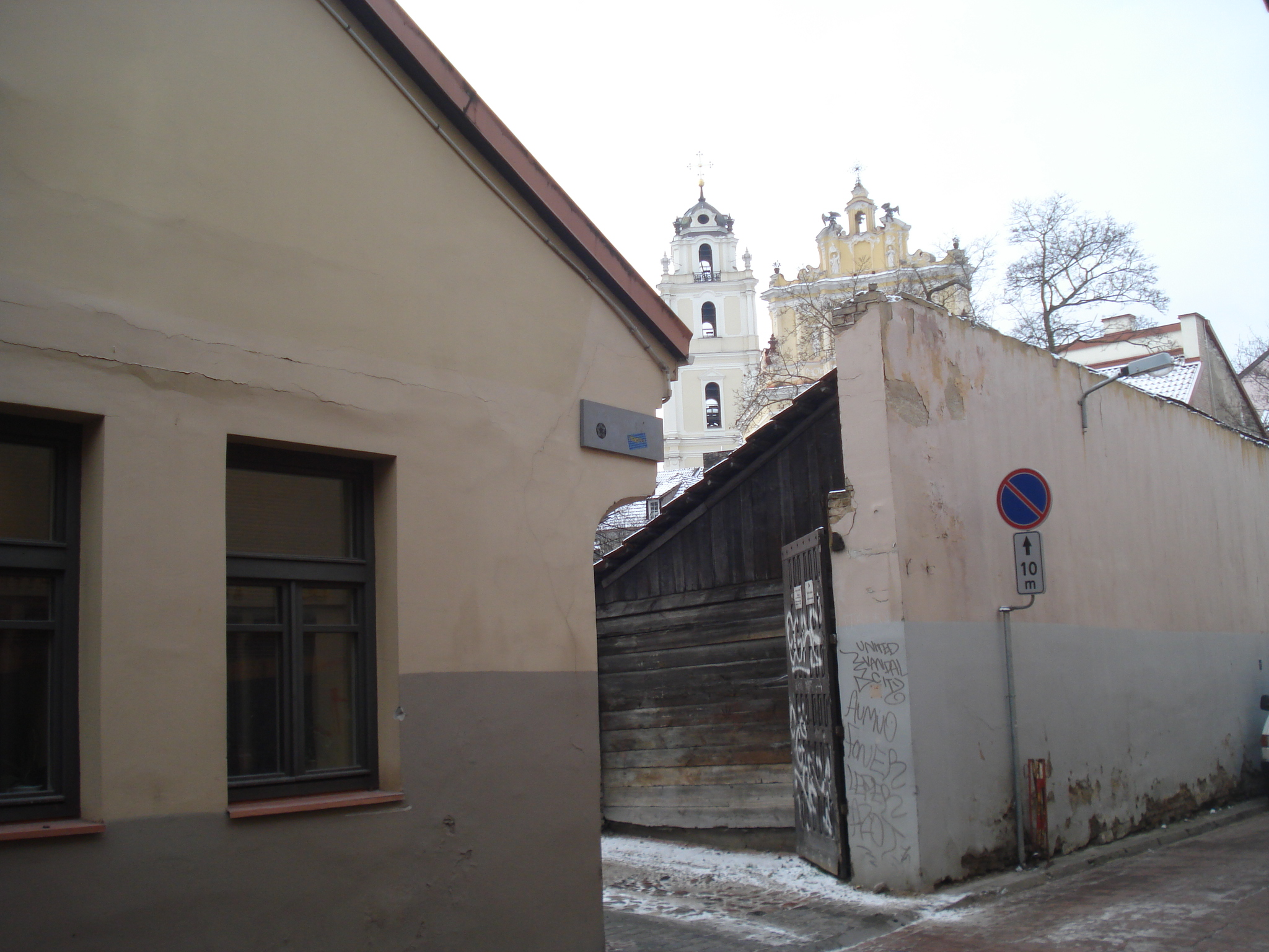 Улица Швянто Миколо. Южная нечётная сторона (Вильнюс)